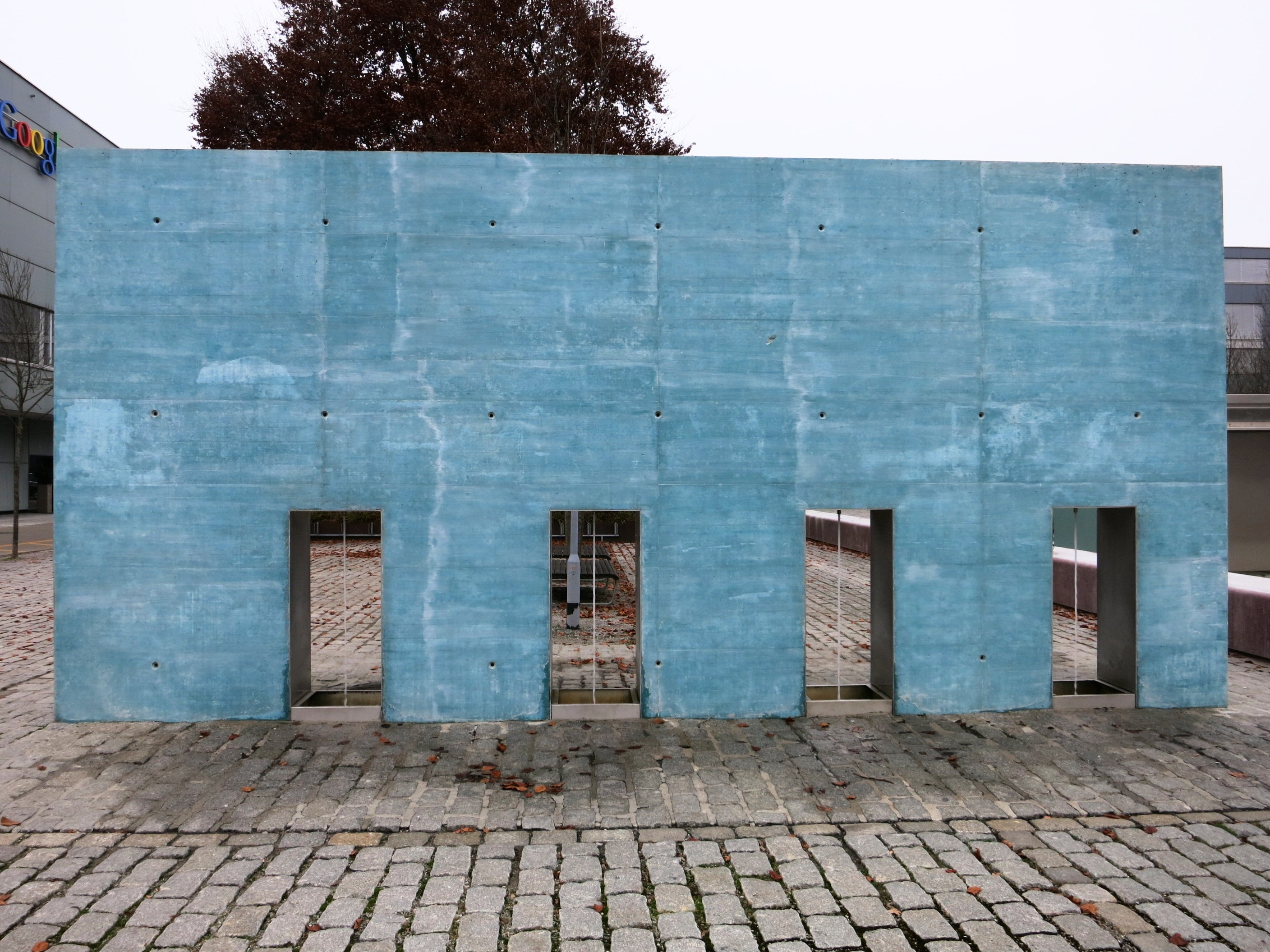 Brunnen auf dem Hürlimann-Areal, Zürich-Enge ZH, Schweiz